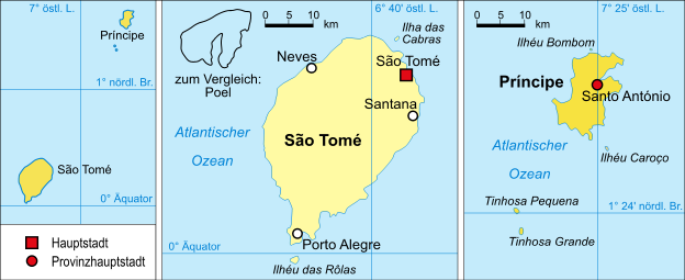 politische Karte von Sao Tome und Principe (Provinz Principe hervorgehoben)